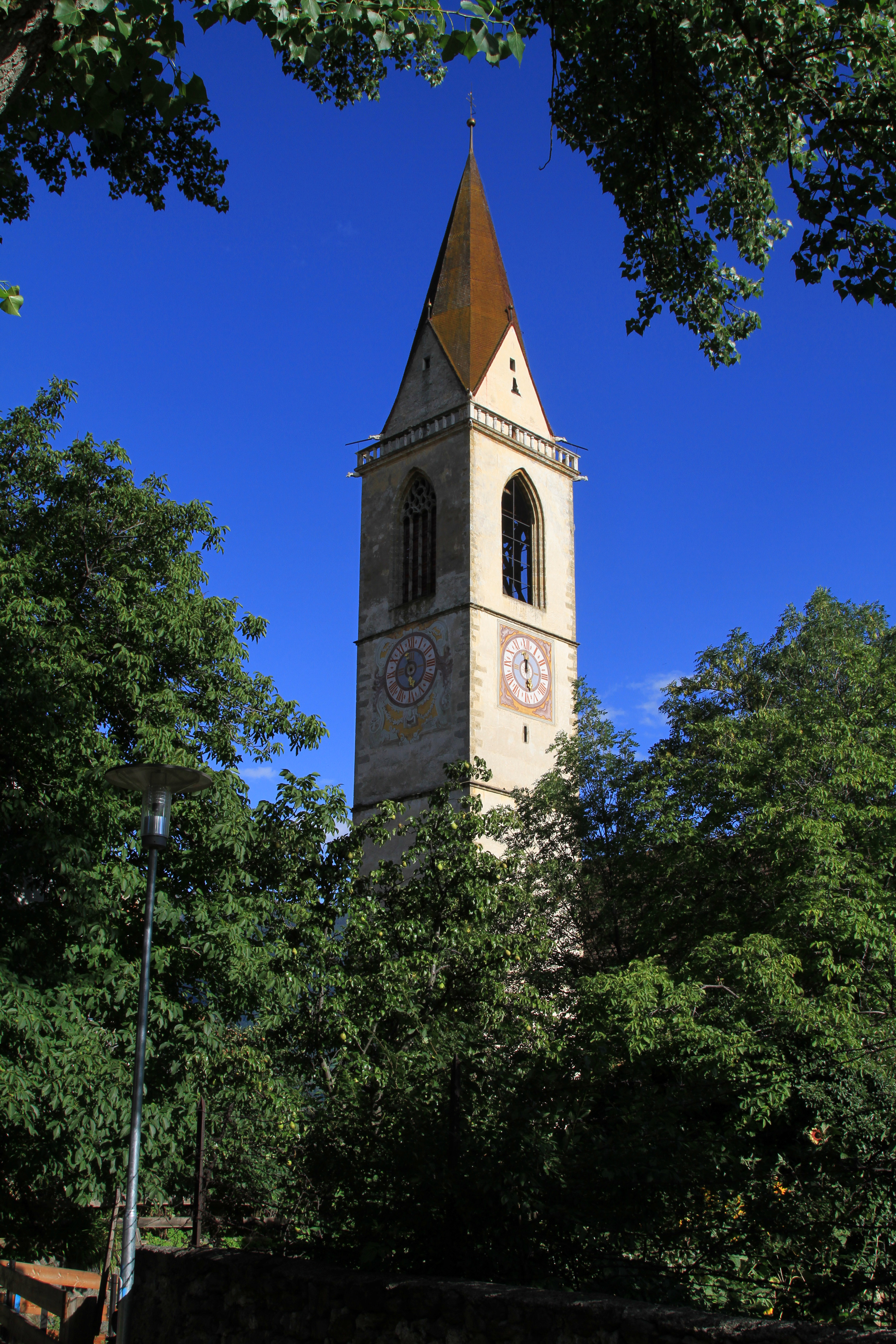 Malles Venosta/Mals: Campanile della Chiesa Parrocchiale di Santa Maria Assunta.